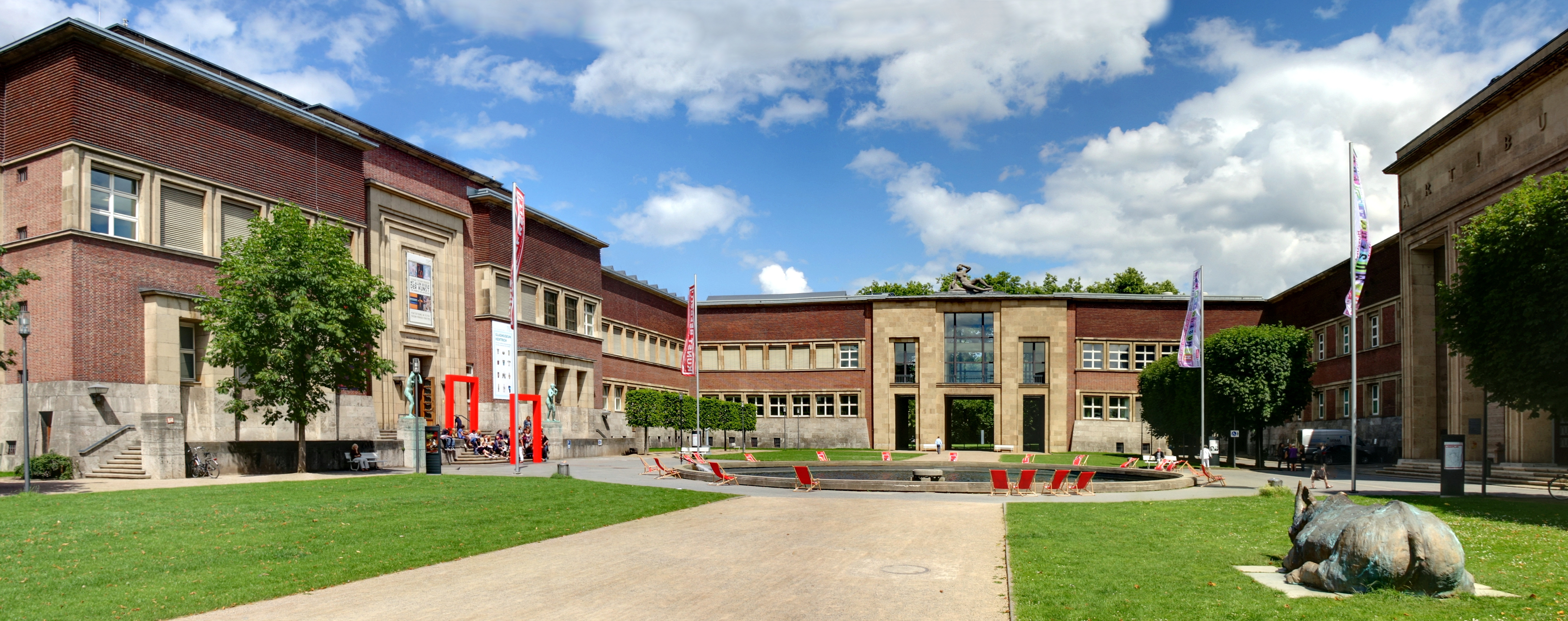 Museum Kunstpalast, Ehrenhof, Blick Richtung Norden auf den Innenhof mit Brunnen und dem Übergang („Triumpfbogen“) zwischen West- und Ostflügel. Vorne rechts liegt die Bronze-Skulptur „Nashorn“ von Johannes Brus.